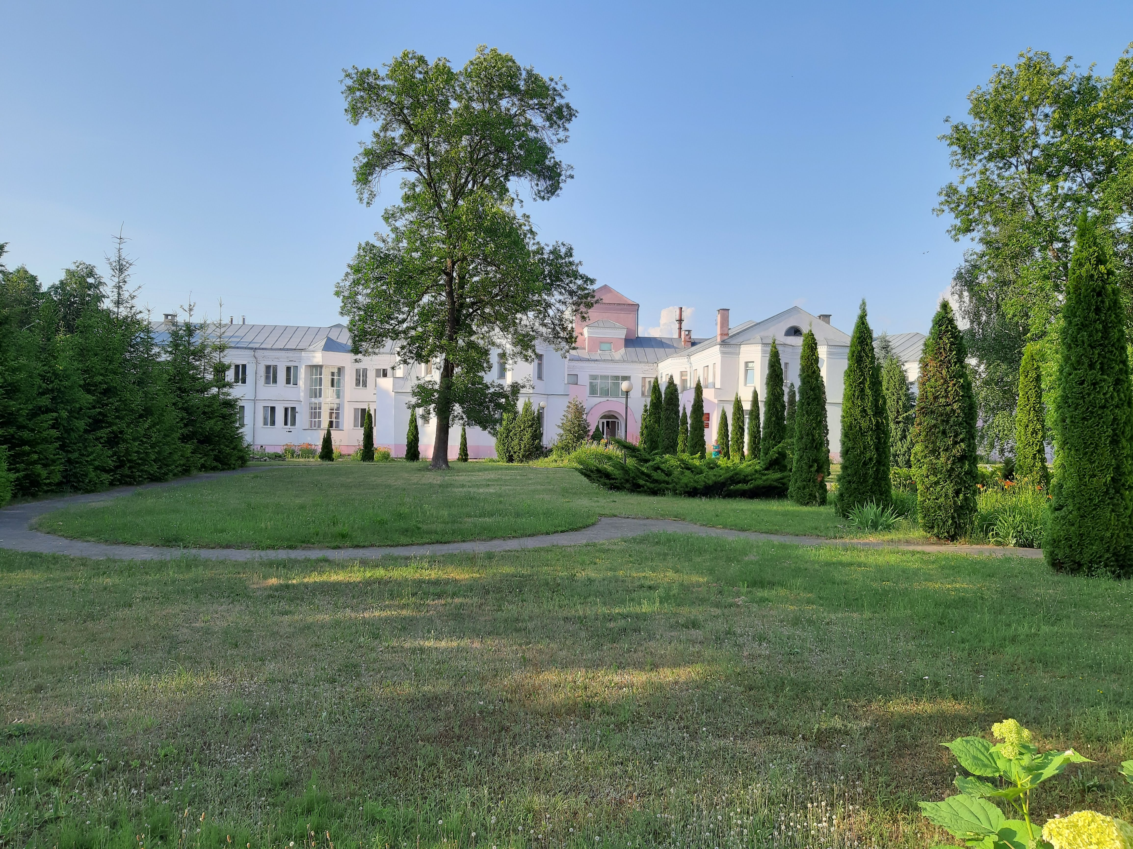 Магілёў. Дом дзіцяці